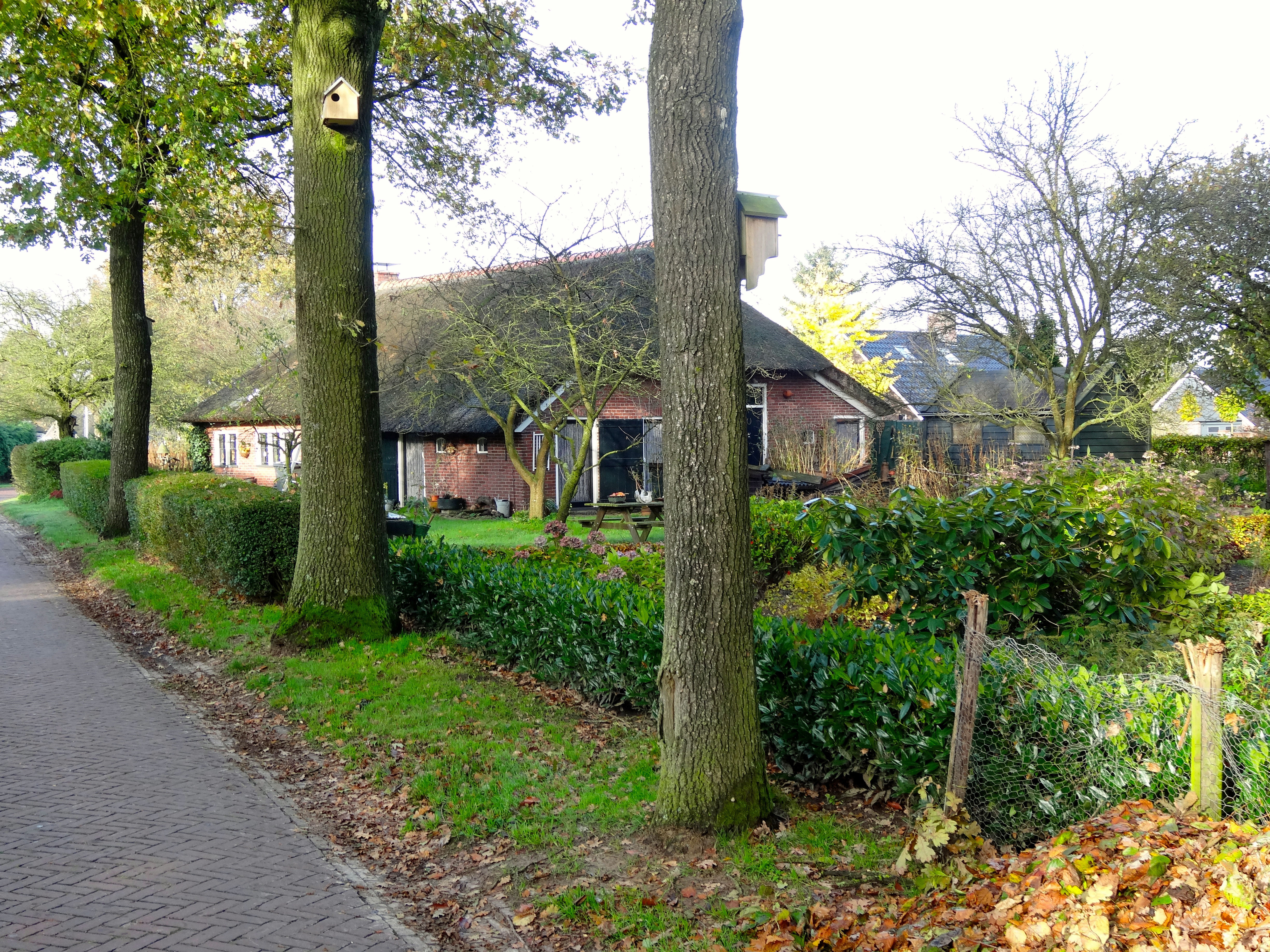 Dorpsgezicht Drouwen - Schoolstraat